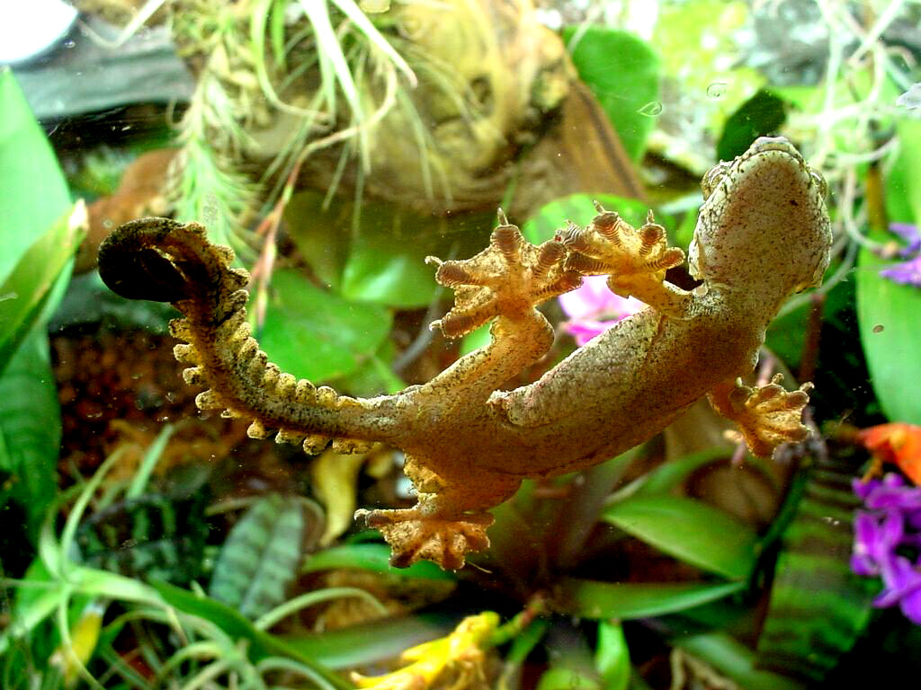 Imported from de: Original comment: Der Falten-Gecko Ptychozoon kuhli. Diese Gecko-Art kann nicht nur - wie hier - an Glasscheiben laufen, sondern er ist auch zum Segelflug befähigt. Terrarienaufnahme. Foto: Manuel Werner, Nürtingen, Deutschland Picture of a gecko Ptychozoon kuhli.